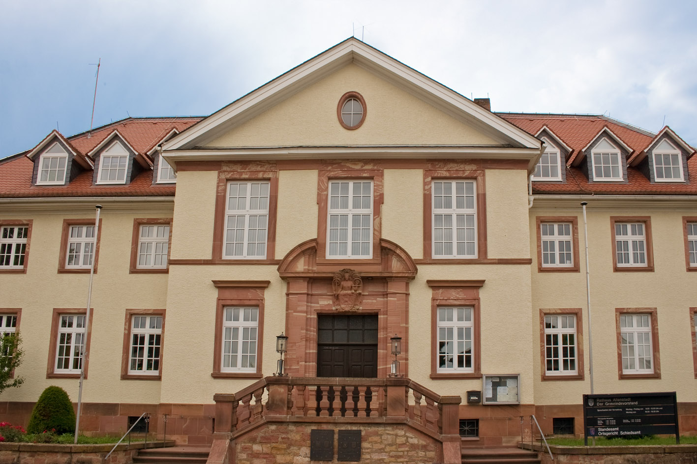 Rathaus der Gemeinde Altenstadt, Hessen, in Deutschland.